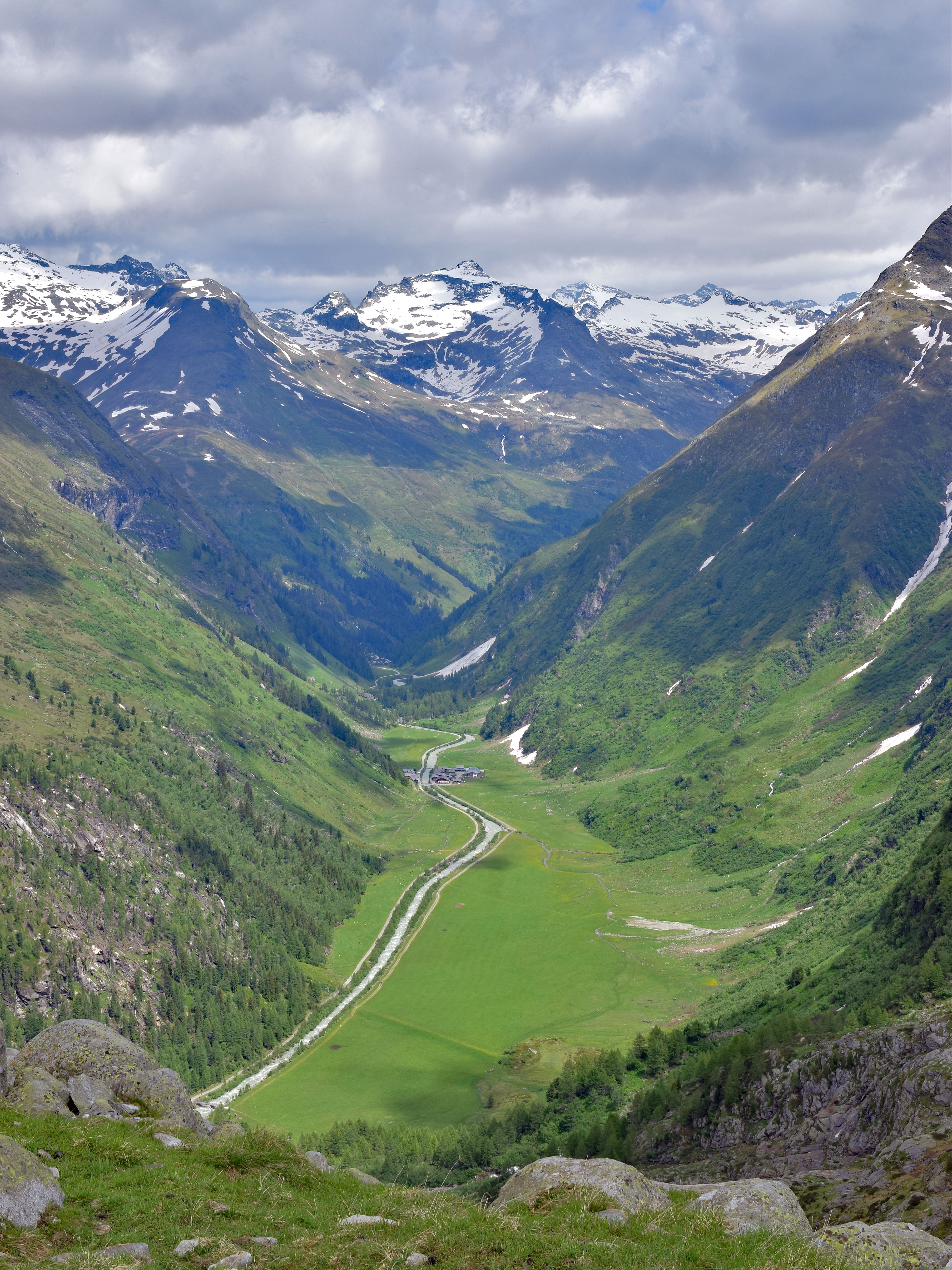 Der Abstieg führt entlang des Keesbachs, der heute kaum mehr Wasser führt, jedoch bis in die 1960er-Jahre den überwiegenden Teil des Schmelzwassers aus dem Schlatenkees entwässert hat (siehe das Bachbett in der rechten unteren Bildecke). Von hier aus kann man das ganze Gschlösstal überblicken. This file shows the National Park Hohe Tauern in Austria.